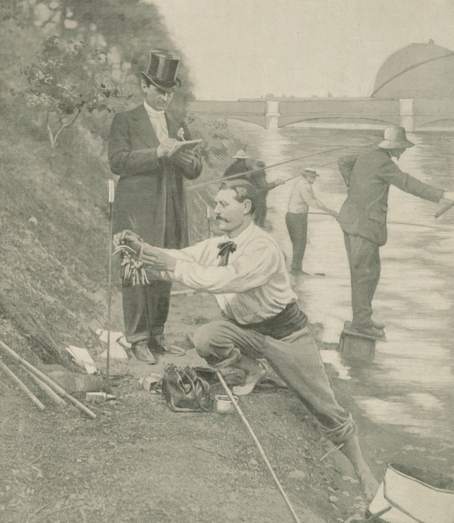 Le concours international de pêche à la ligne à l'exposition universelle de 1900.